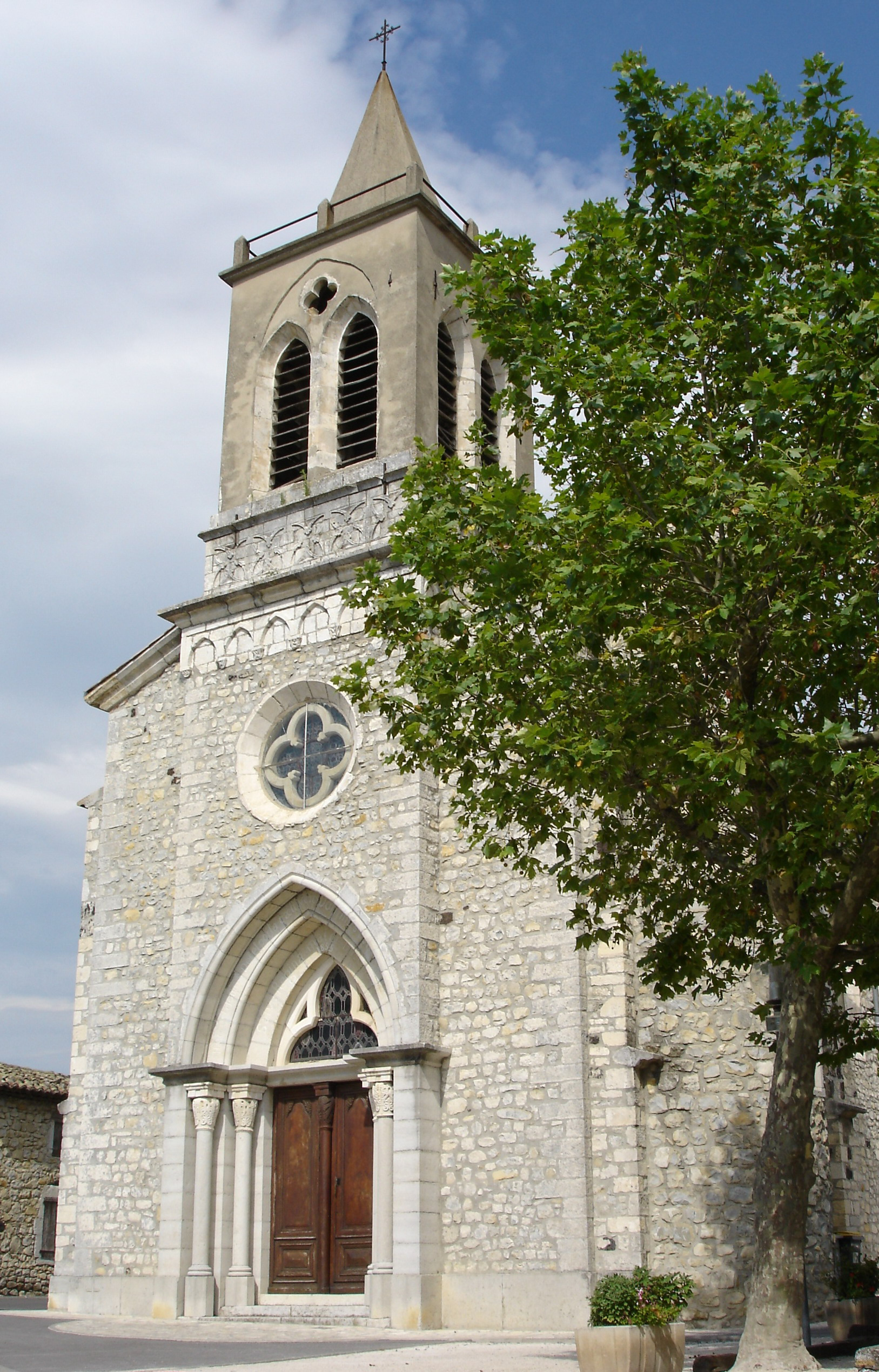 Façade Eglise de Saint-Andéol-de-Berg - Ardèche - France